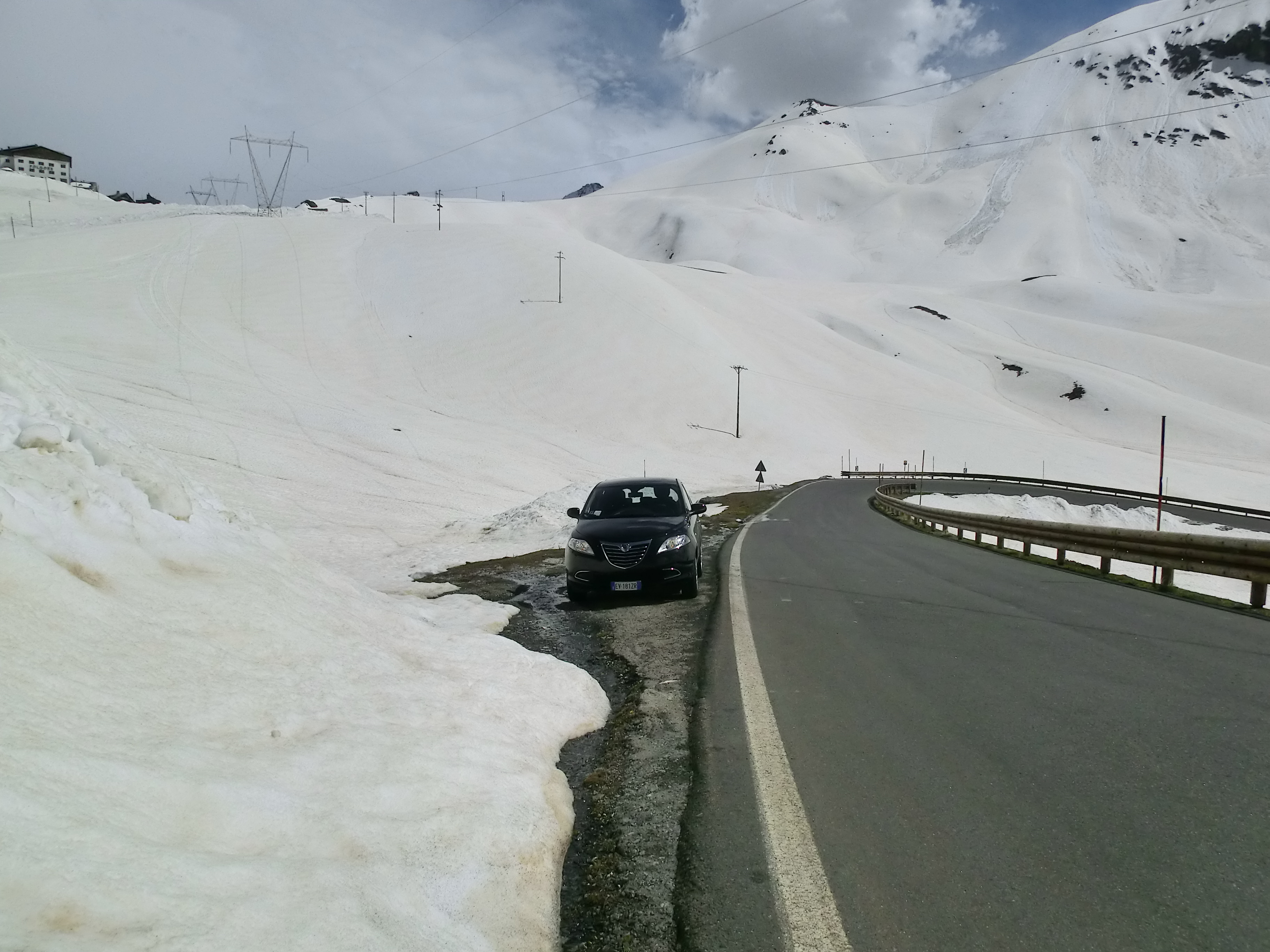 Чем выше забирается дорога на Стельвио, тем больше снега со всех сторон, который на самом перевале может быть уже в несколько раз выше любого транспорта.